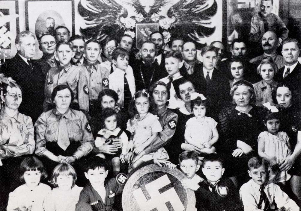 Преподаватели и ученики русской фашистской библейской школы в Нью-Йорке (30-е гг.)